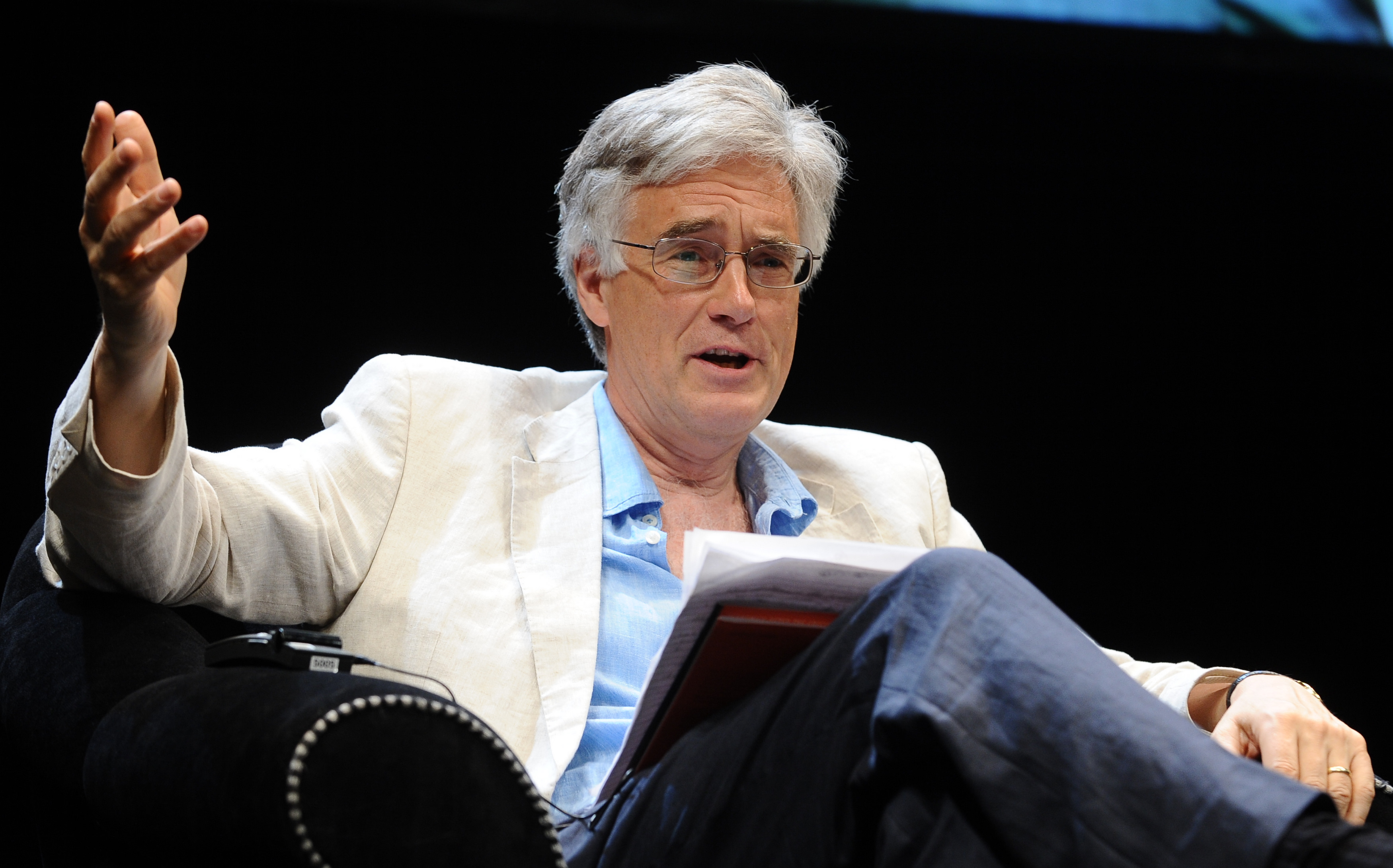 Adair Turner - Festival Economia - Trento 2012